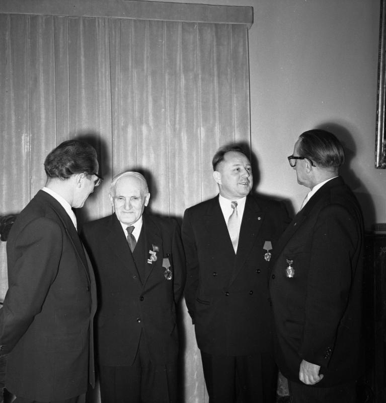 Berlin, Karl-Marx-Orden für Erich Mielke ADN-ZB/Sturm 28.12.1957 Berlin: Verleihung des Karl-Marx-Orden an den Minister für Staatssicherheit Generalleutnant Erich Mielke (2.v.r.) und den Arbeiterveteran Josef Miller (2.v.l.). Gespräch nach der Auszeichnung mit Erich Honecker, Kanidat des Politbüros des ZK der SED (l.) und Staatssekretär Max Opitz. Abgebildete Personen: Mielke, Erich: Minister für Staatssicherheit, Armeegeneral, Politbüro des Zentralkomitees (ZK) der SED, DDR (GND 118977490) Miller, Josef: Arbeiterveteran, DDR Honecker, Erich: Staatsratsvorsitzender, Generalsekretär des ZK der SED, DDR (GND 118553399) Opitz, Max: Staatssekretär, Chef der Präsidialkanzlei, Vaterländischer Verdienstorden (VVO) in Gold 1965, DDR (GND 132482320)